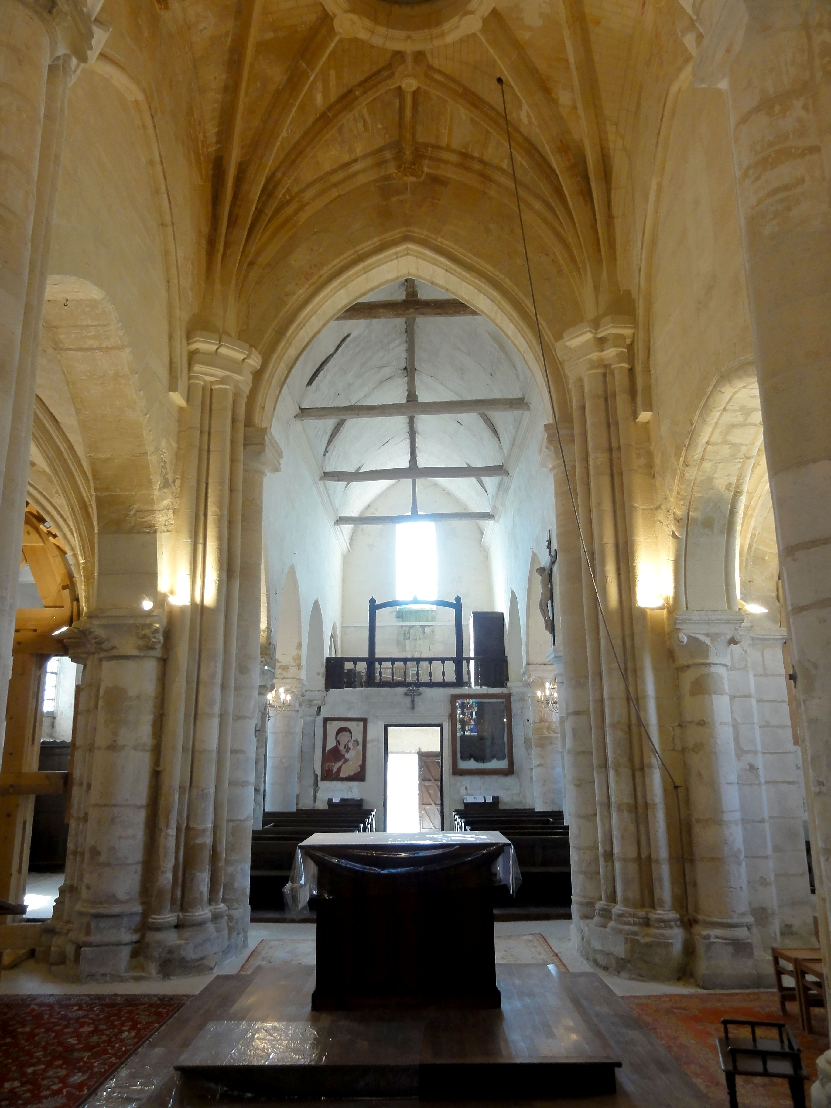 Croisée du transept, vue vers l'ouest.